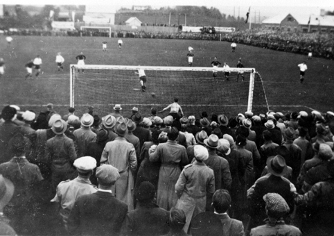 1938 Norwegian Football Cup Final between Fredrikstad FK and Mjølndalen IF at Briskeby gressbane, Hamar